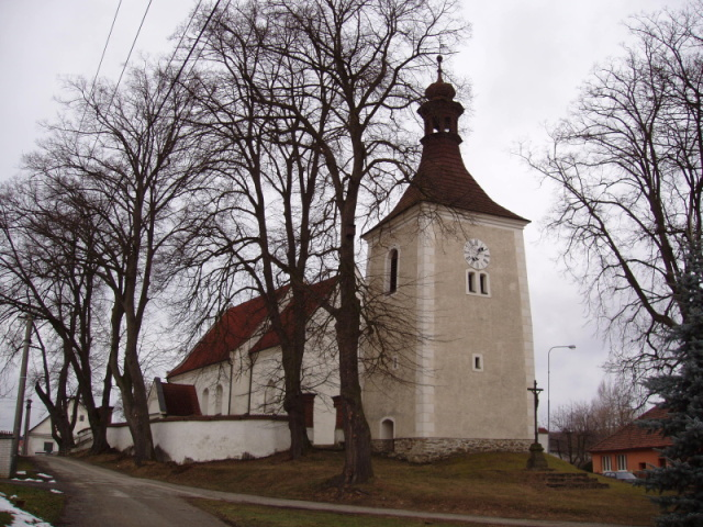 Kostel Narození Panny Marie v Obratani